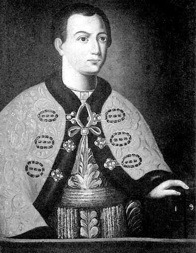 Царь Иоанн V Алексеевич